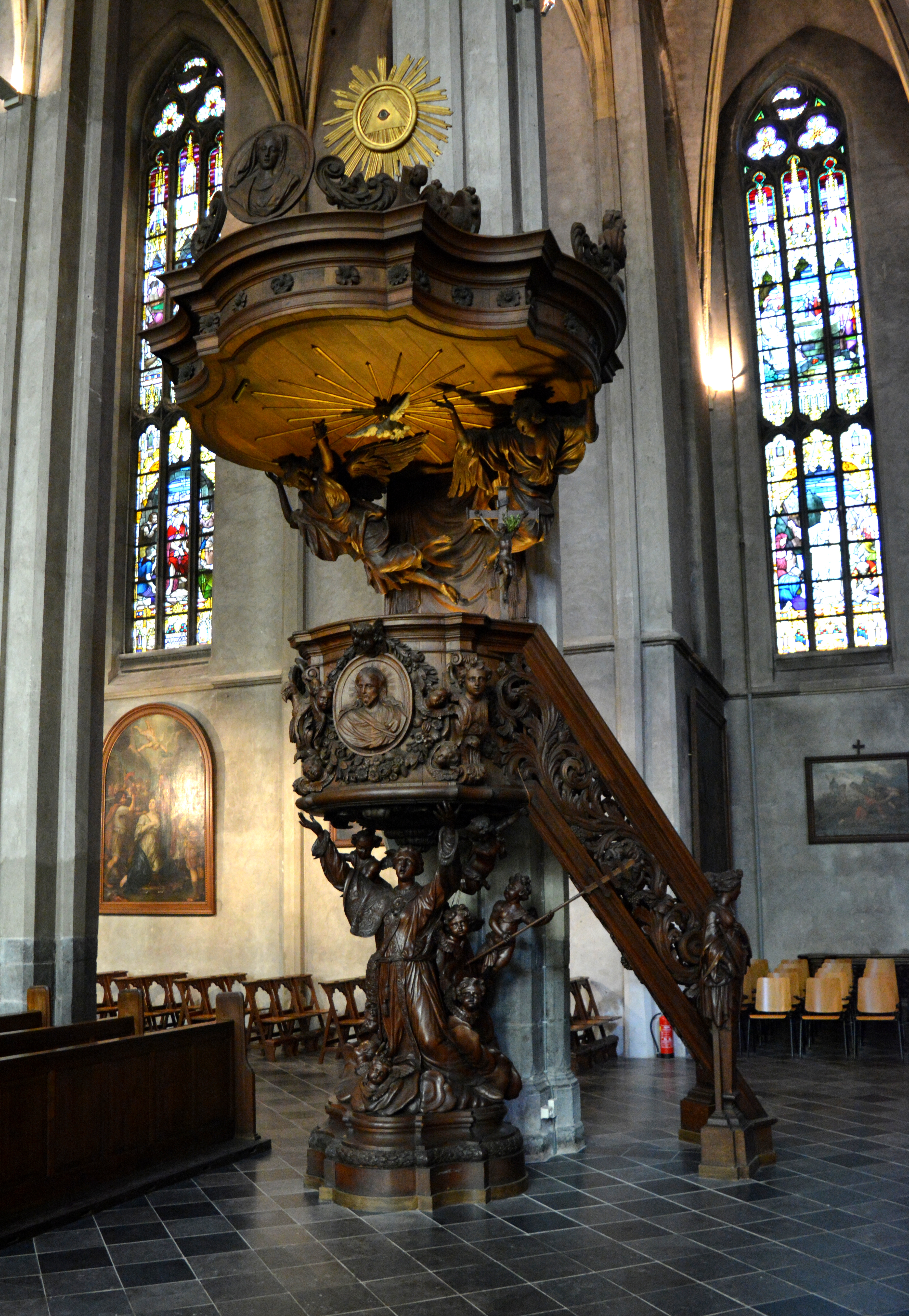 Venlo, Sint-Martinuskerk, barokke preekstoel